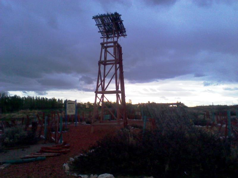 Mangrullo cercano a la tumba de Carmen Funes, en la localidad de Plaza Huincul, Neuquén.